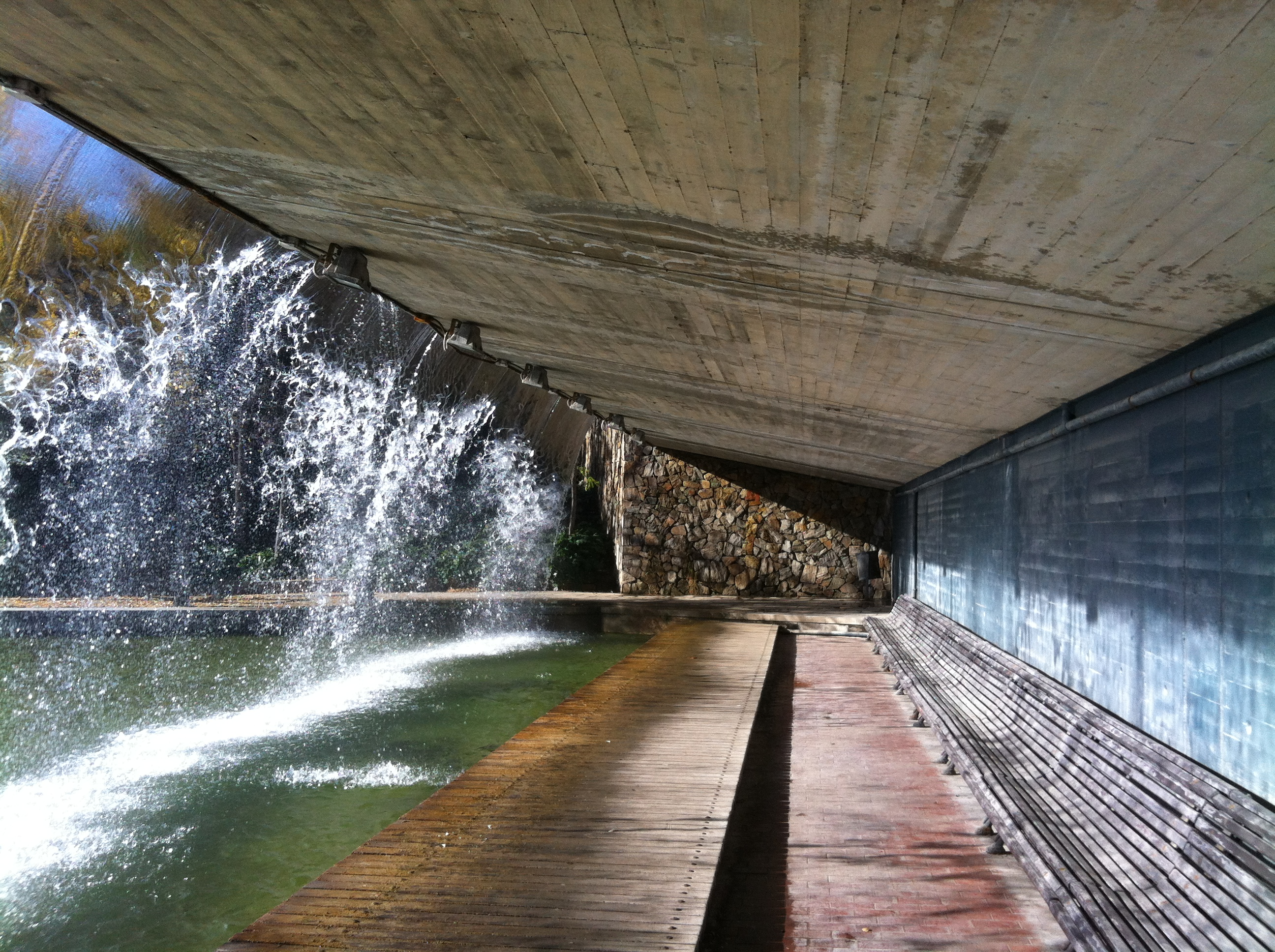 Waterfall in Sabadell